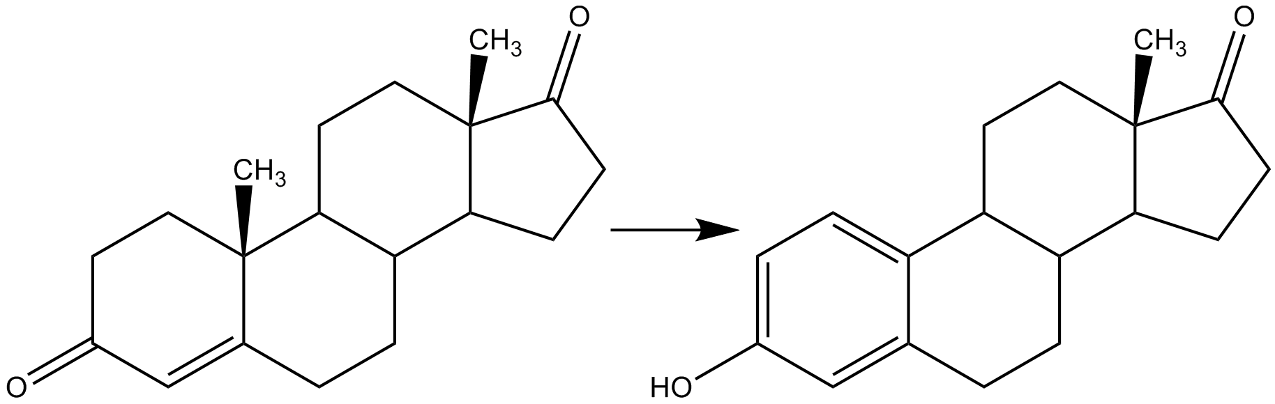 androstendione converting to estrone